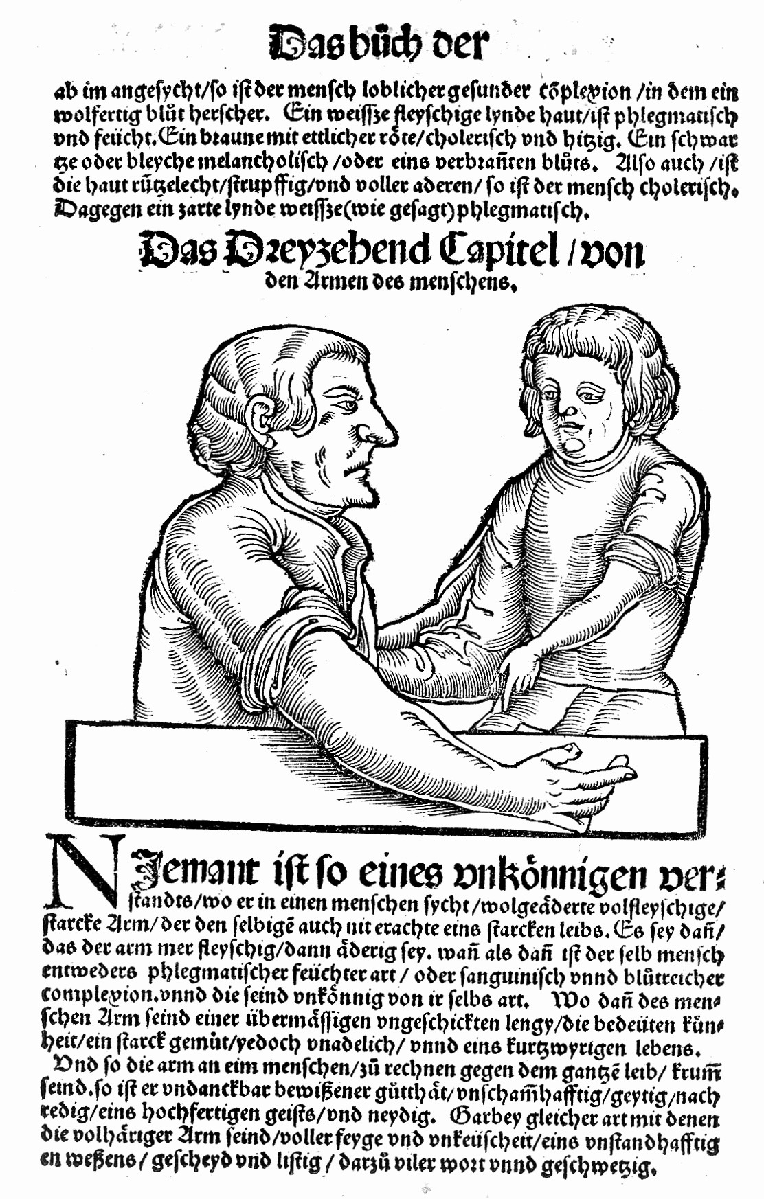 Rare Books Keywords: Johannes de Indagine